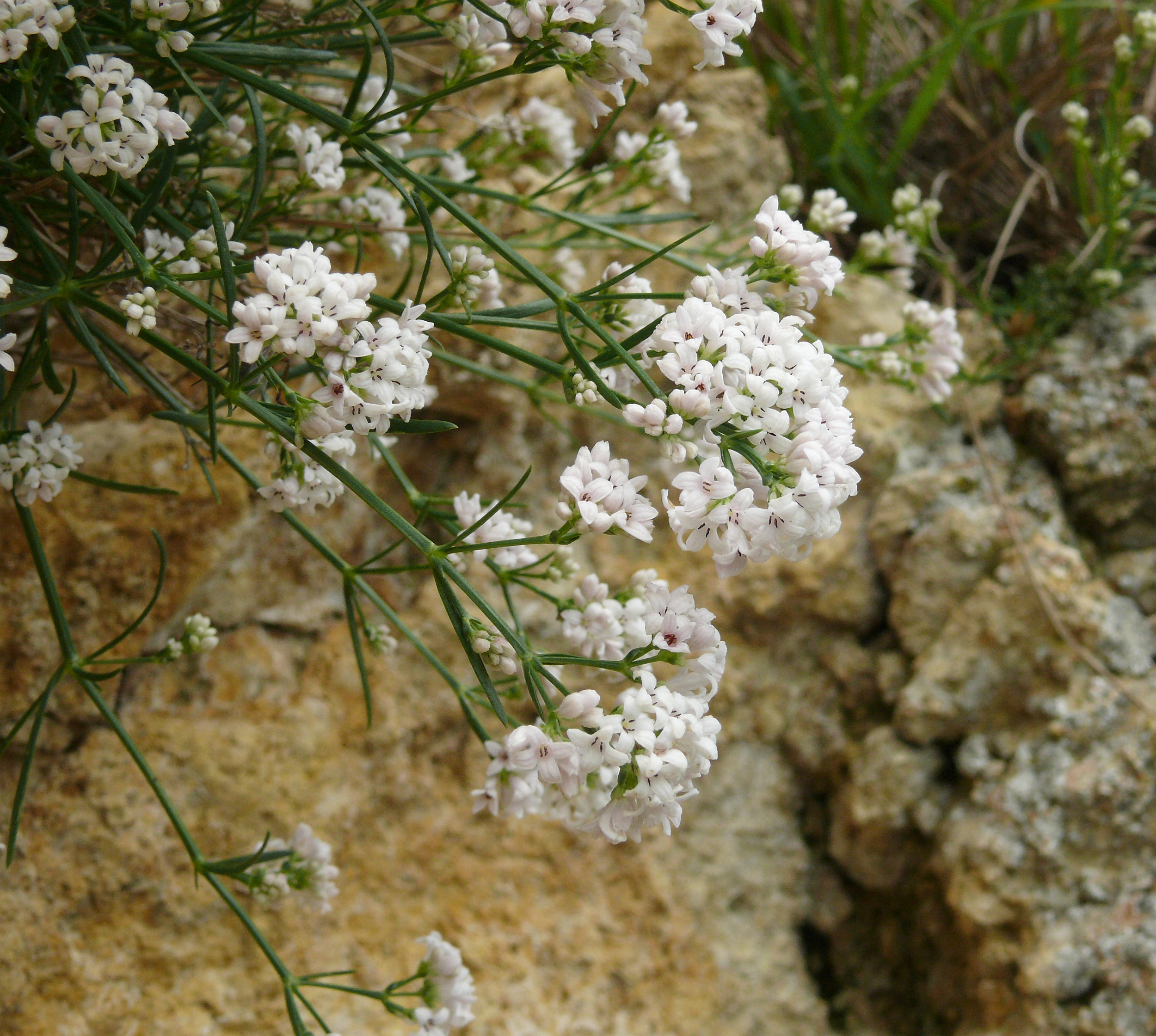 Asperula cynanchica, Nördlinger Ries, Deutschland